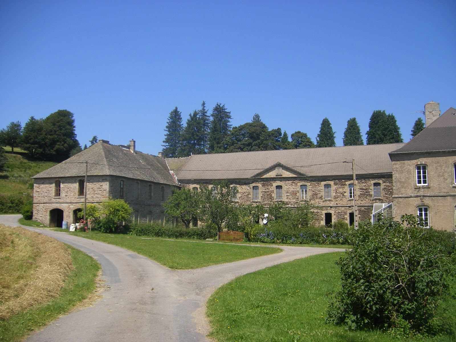 Ancient Mercoire Abbey (commune Cheylard-l'Évêque)